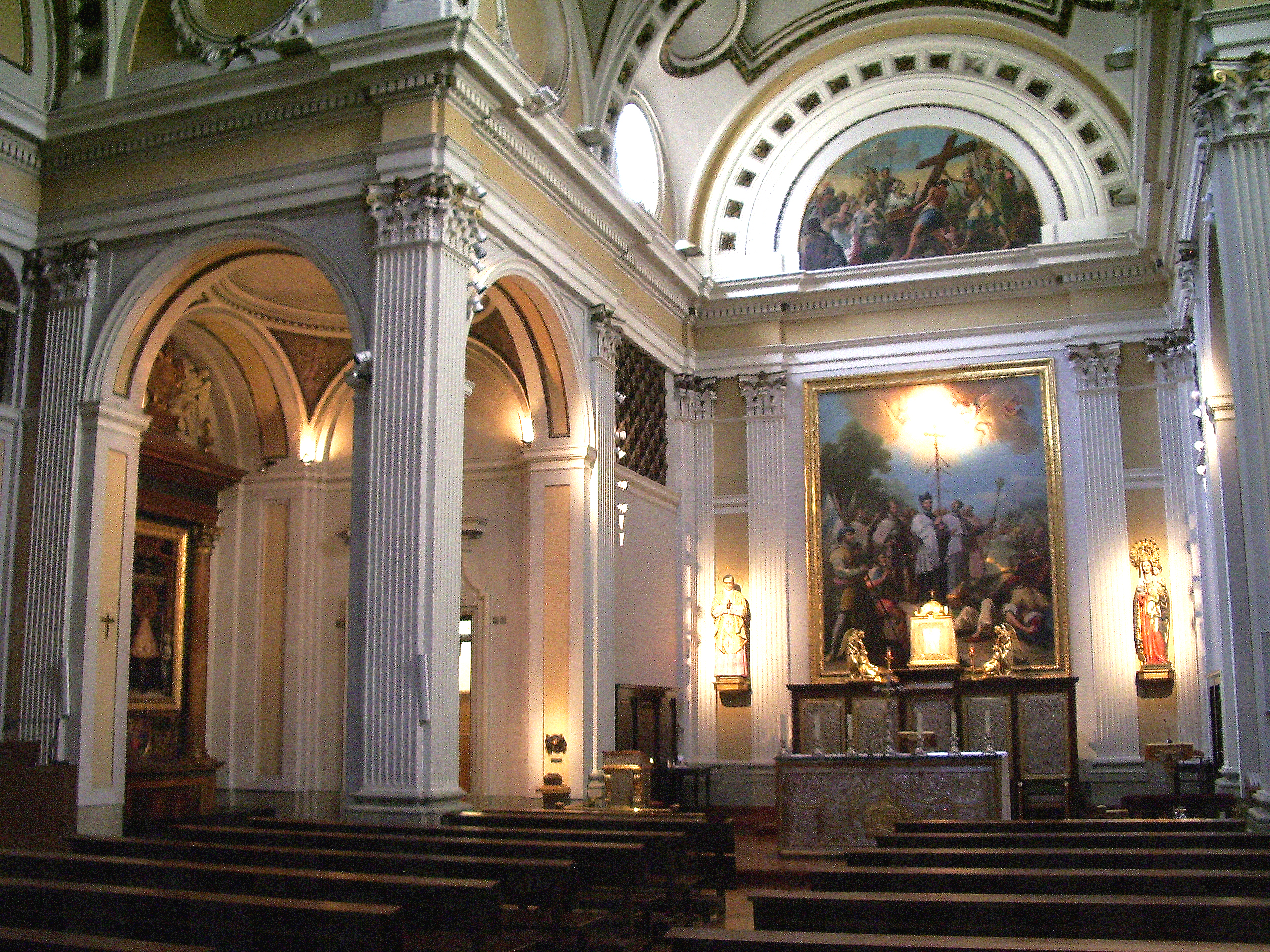 Interior de la Iglesia de la Santa Cruz (Zaragoza, España)